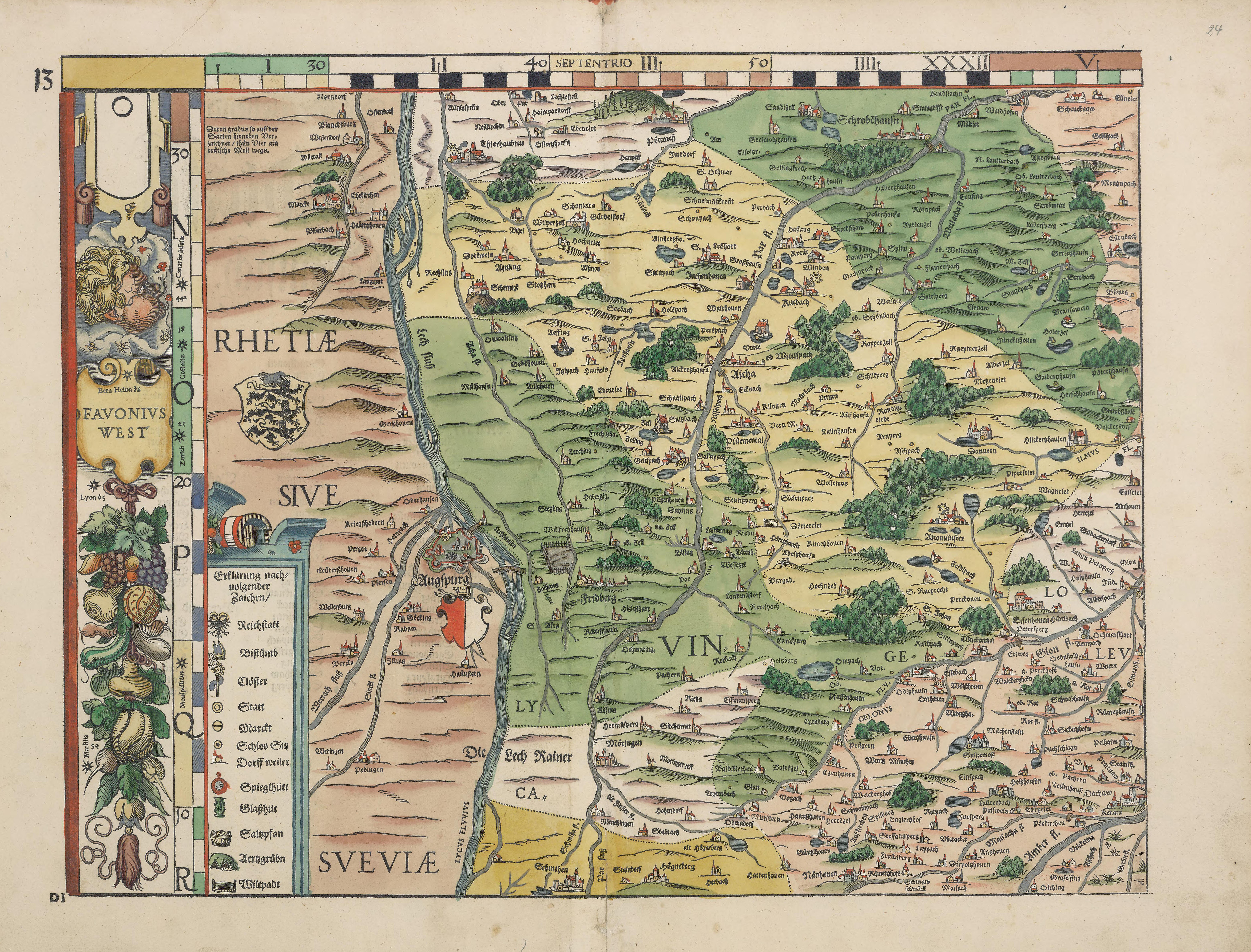 Philipp Apian - Bairische Landtafeln von 1568 (Tafel 13) ca. 1:140.000, Gesamtgröße des Originals 156 x 159 cm, je Blatt 43 x 33 cm Auf der Basis der „Großen Karte“ ließ Philipp Apian 1566 von Jost Amman Holzschnitte im kleineren Maßstab von 1:144.000 anfertigen. Diese so genannten Bairischen Landtafeln, aufgeteilt in 24 Holzschnitte, verlegte Apian in seiner eigenen Druckerei. Die Genauigkeit der Landkarten wurde erst im 19. Jahrhundert übertroffen. Noch Napoleon benutzte sie für den Einmarsch in Bayern. Ein Originaldruck der Karte ist im Stadtmuseum Ingolstadt ausgestellt, die Druckstöcke befinden sich heute im Bayerischen Nationalmuseum in München. Abraham Ortelius verbreitete kolorierte Kupferstiche dieser Landtafeln in Buchform „ex tabula Philippi Apiani“.